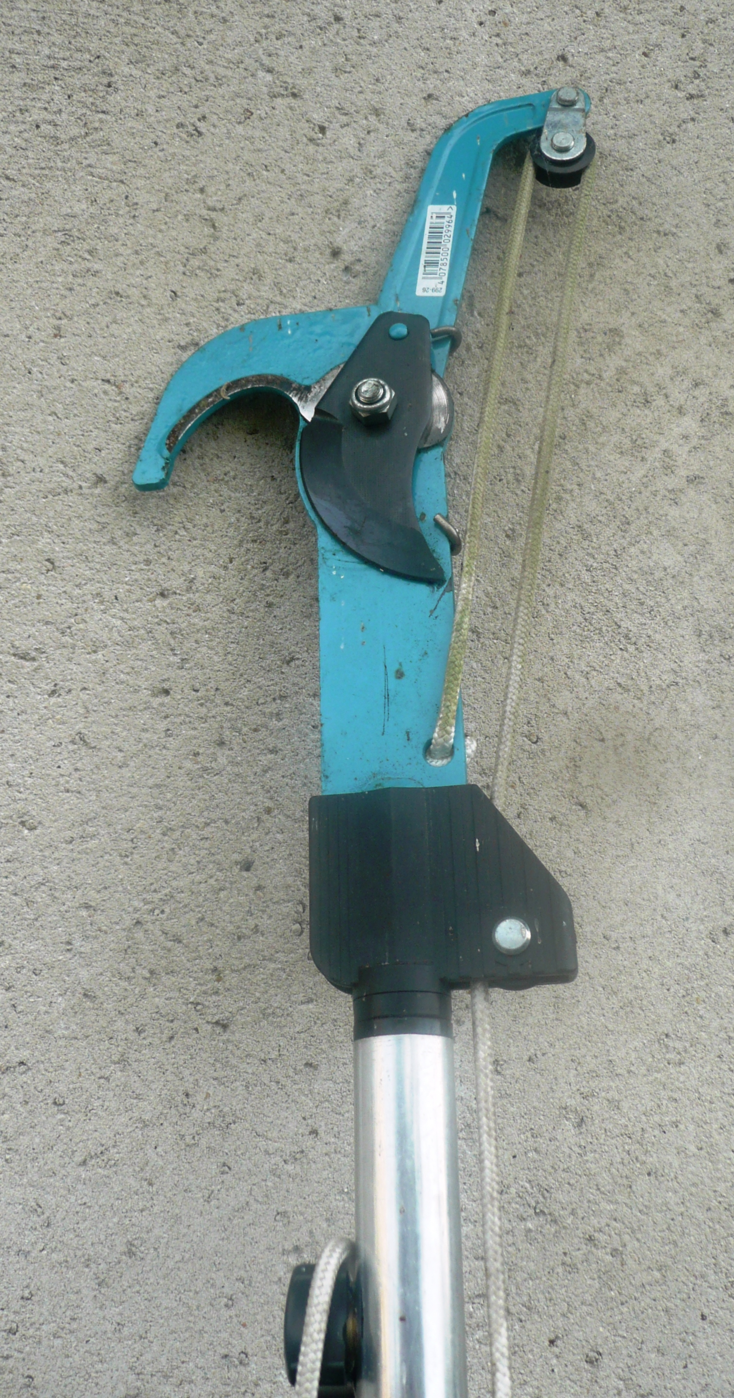 Exemple de tête d'échenilloir